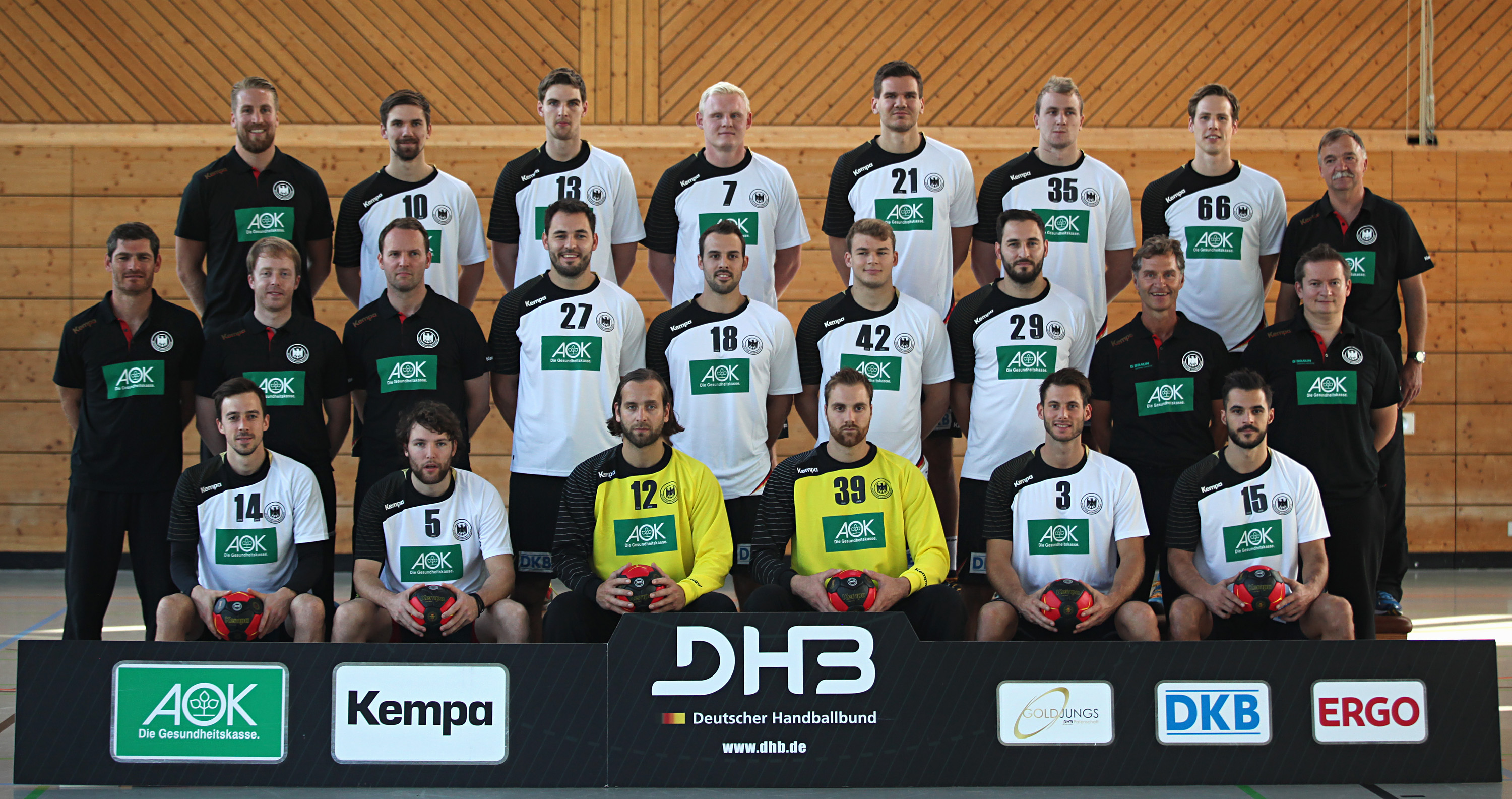 Die Deutsche Handball-Nationalmannschaft der Männer am 16. September 2014, einen Tag nach dem offiziellen Amtsantritt von Bundestrainer Dagur Sigurðsson, in Heilbronn.Hinten von links: Teammanager Oliver Roggisch, Fabian Wiede, Hendrik Pekeler, Patrick Wiencek, Erik Schmidt, Julius Kühn, Sven-Sören Christophersen, Mannschaftsarzt Prof. Dr. Kurt Steuer Mitte: Torwarttrainer Henning Fritz, Co-Trainer Jochen Beppler, Bundestrainer Dagur Sigurdsson, Michael Müller, Tim Kneule, Paul Drux, Philipp Müller, Physiotherapeut Peter Gräschus, Physiotherapeut Sven Raab Vorn: Patrick Groetzki, Johannes Sellin, Silvio Heinevetter, Andreas Wolff, Uwe Gensheimer, Michael Allendorf